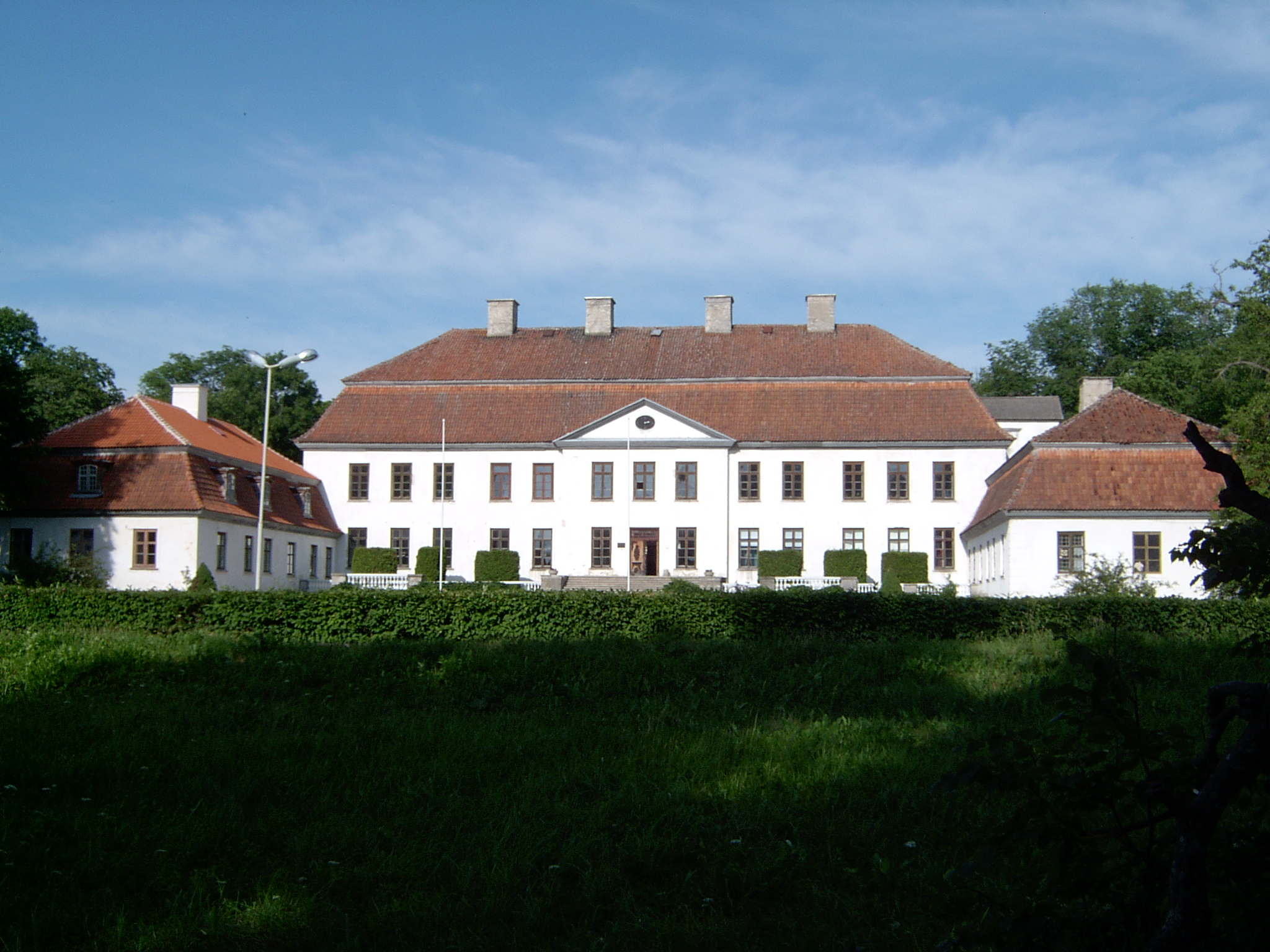 Suuremõisa loss. Vaade läänest. Suuremõisa küla, Pühalepa vald, Hiiumaa, Eesti.